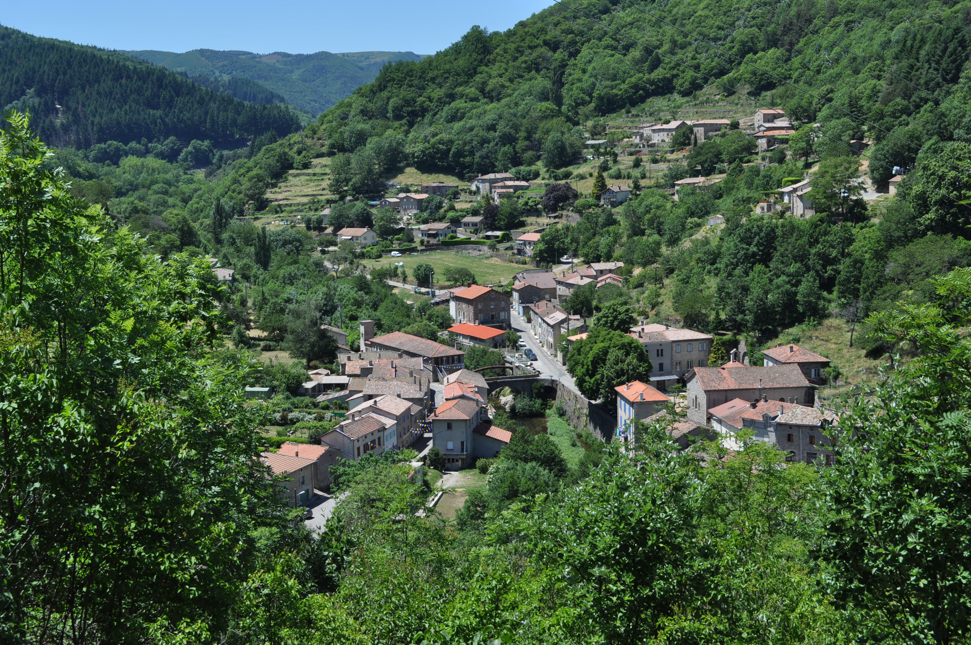 Vue générale du village d'Albon (Ardèche) depuis le Sud du village